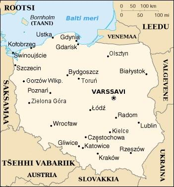 Poola kaart